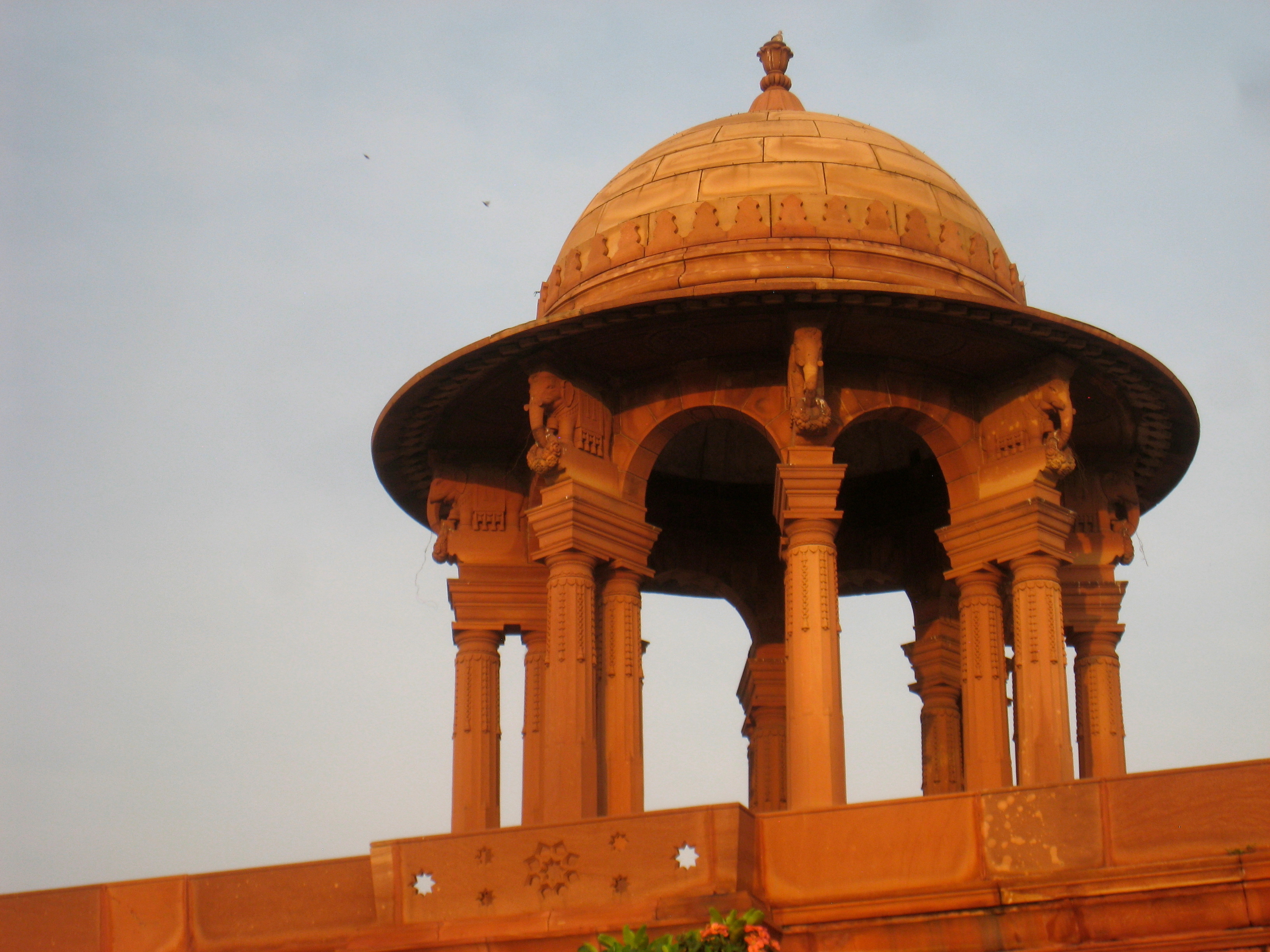 Rashtrapati Bhavan at dawn, New Delhi, India.